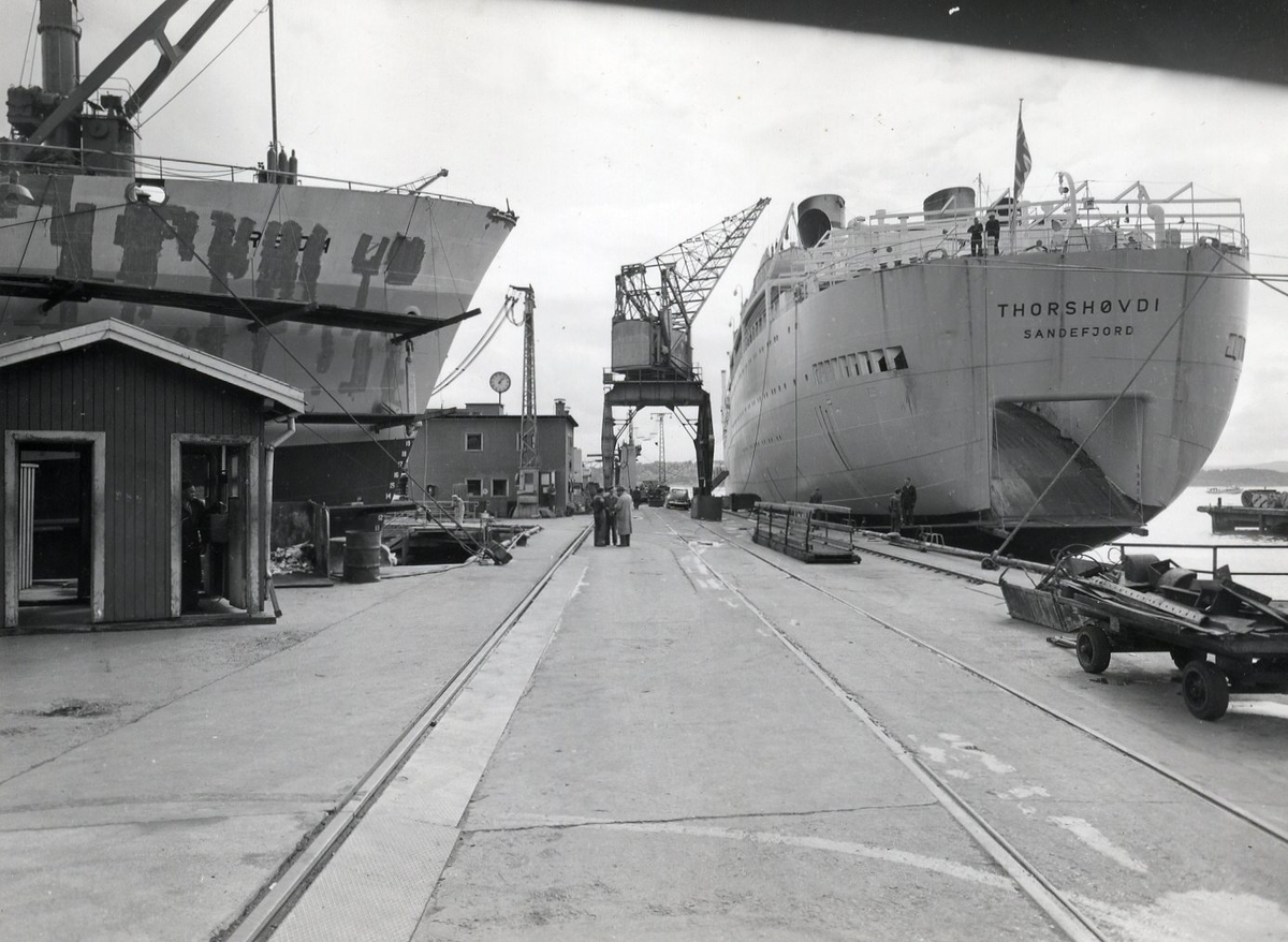 Hvalkokeriet Thorshøvdi av Sandefjord ved Akers Mekaniske Verksted